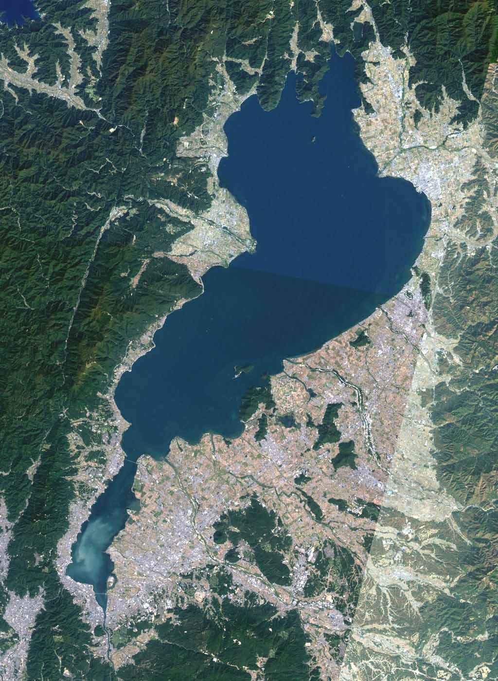 Lake Biwa in Japan.